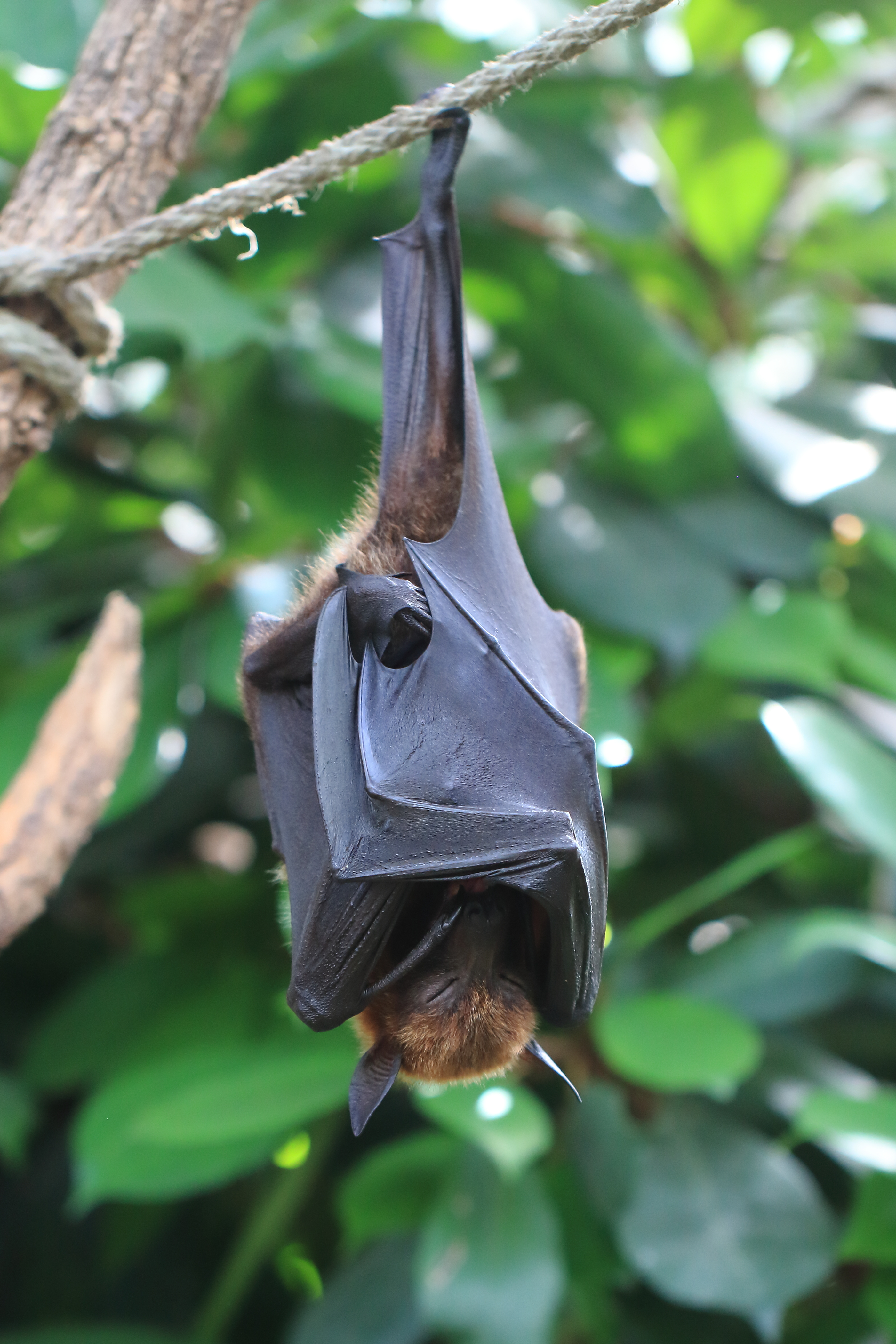 Kalong-Flughund, Pteropus vampyrus, schlafend / ruhend an einem Seil hängend im Schmetterlingshaus der Wilhelma (Zoo Stuttgart)